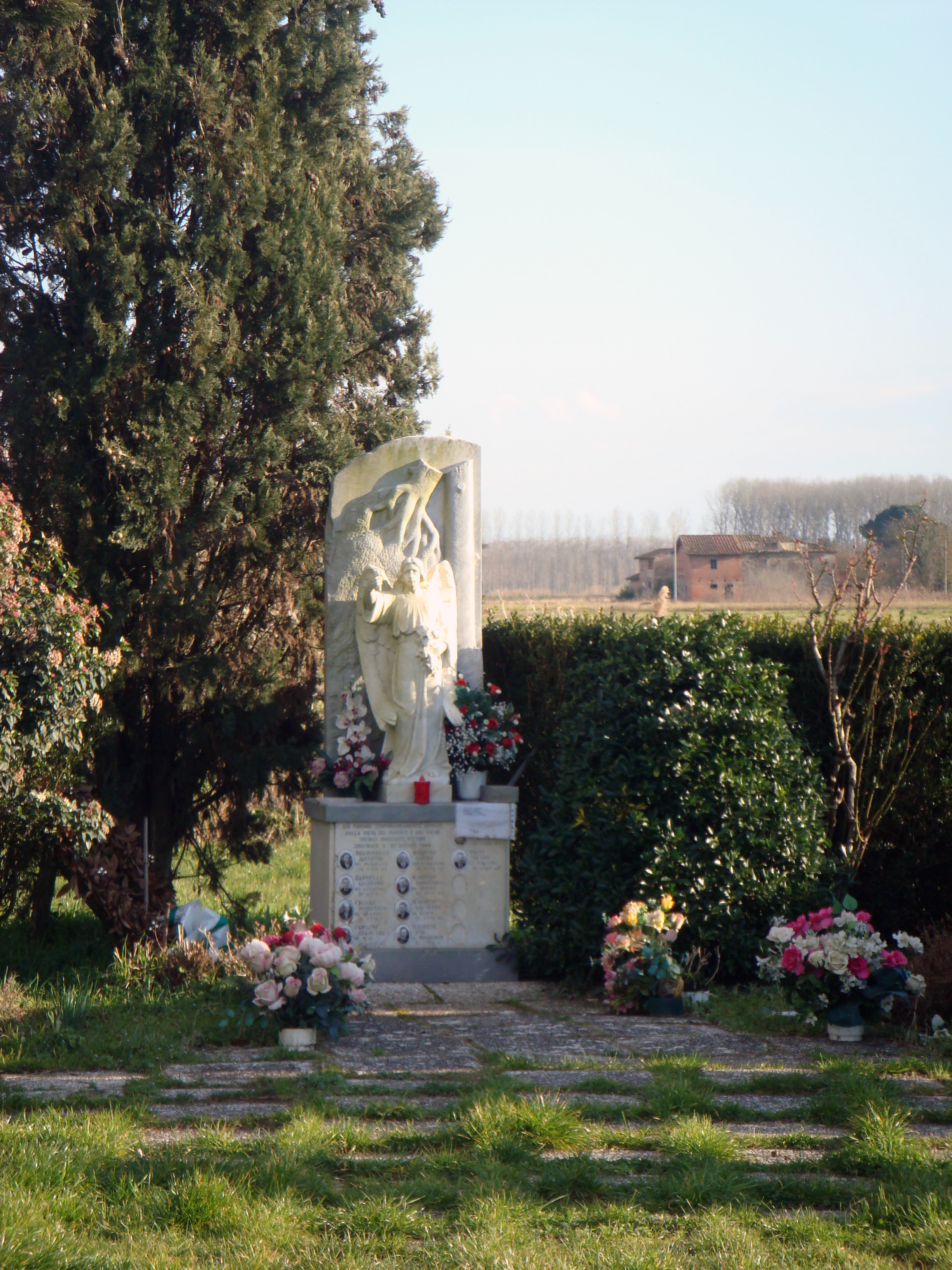 Il Monumento in memoria delle vittime dell'Eccidio del Padule di Fucecchio in località Pratogrande, nel Comune di Ponte Buggianese